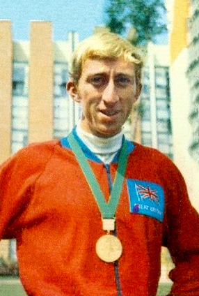 Campioni dello Sport Panini 1969-70 n.47 Hemery